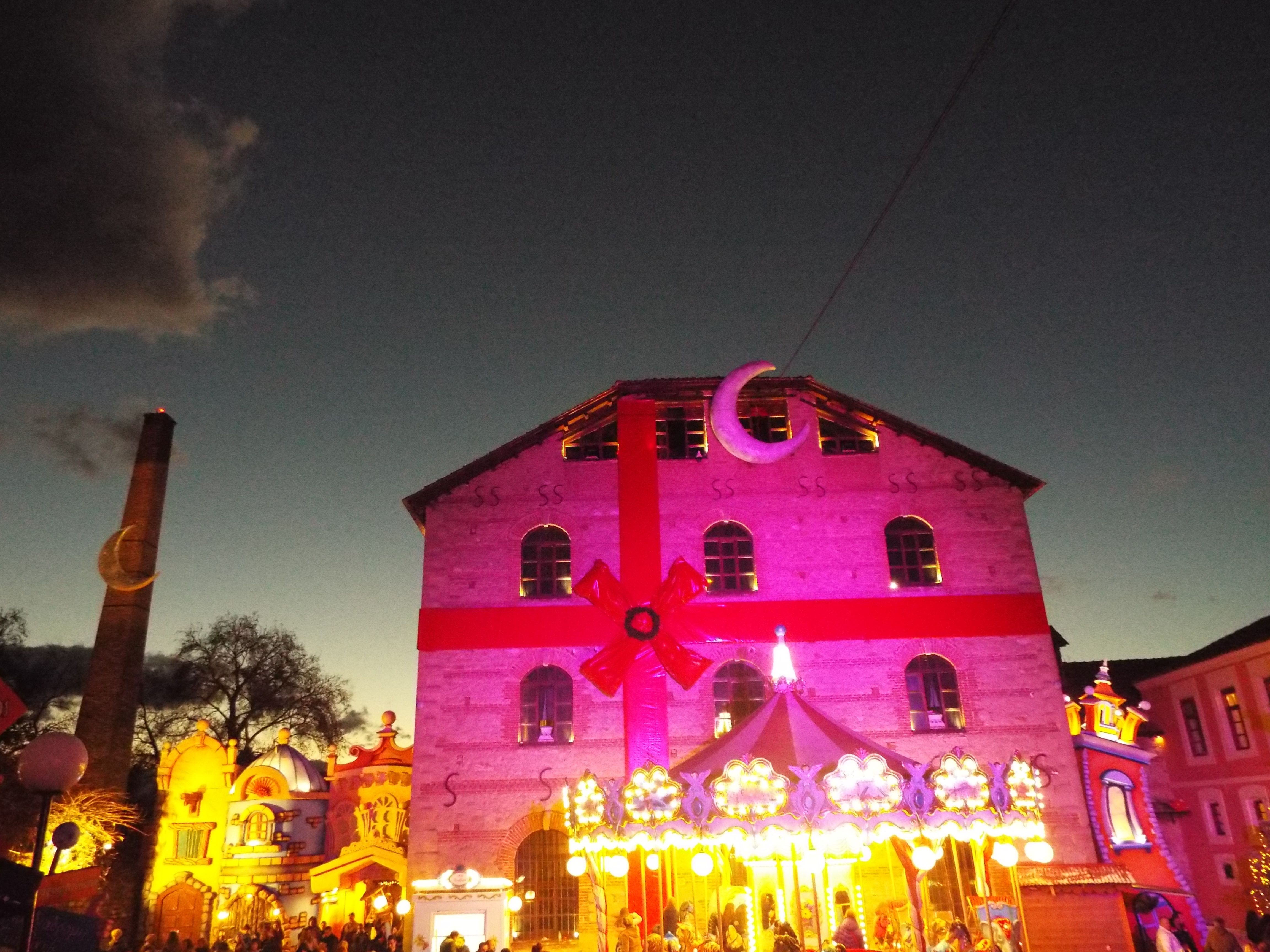 Η κεντρική εικόνα του Μύλου των Ξωτικών το 2017